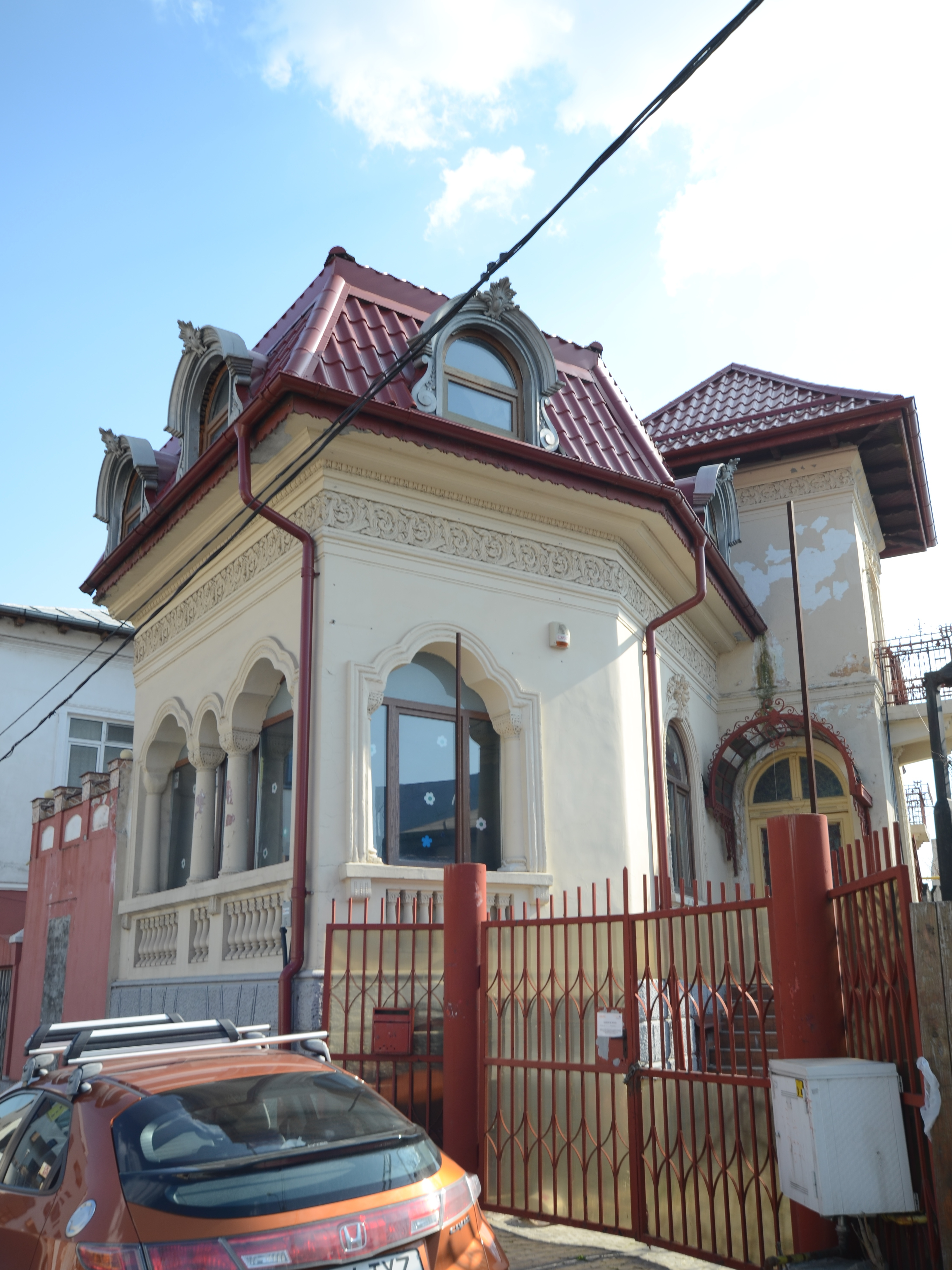 Casă, Str. Ion Minulescu nr. 38